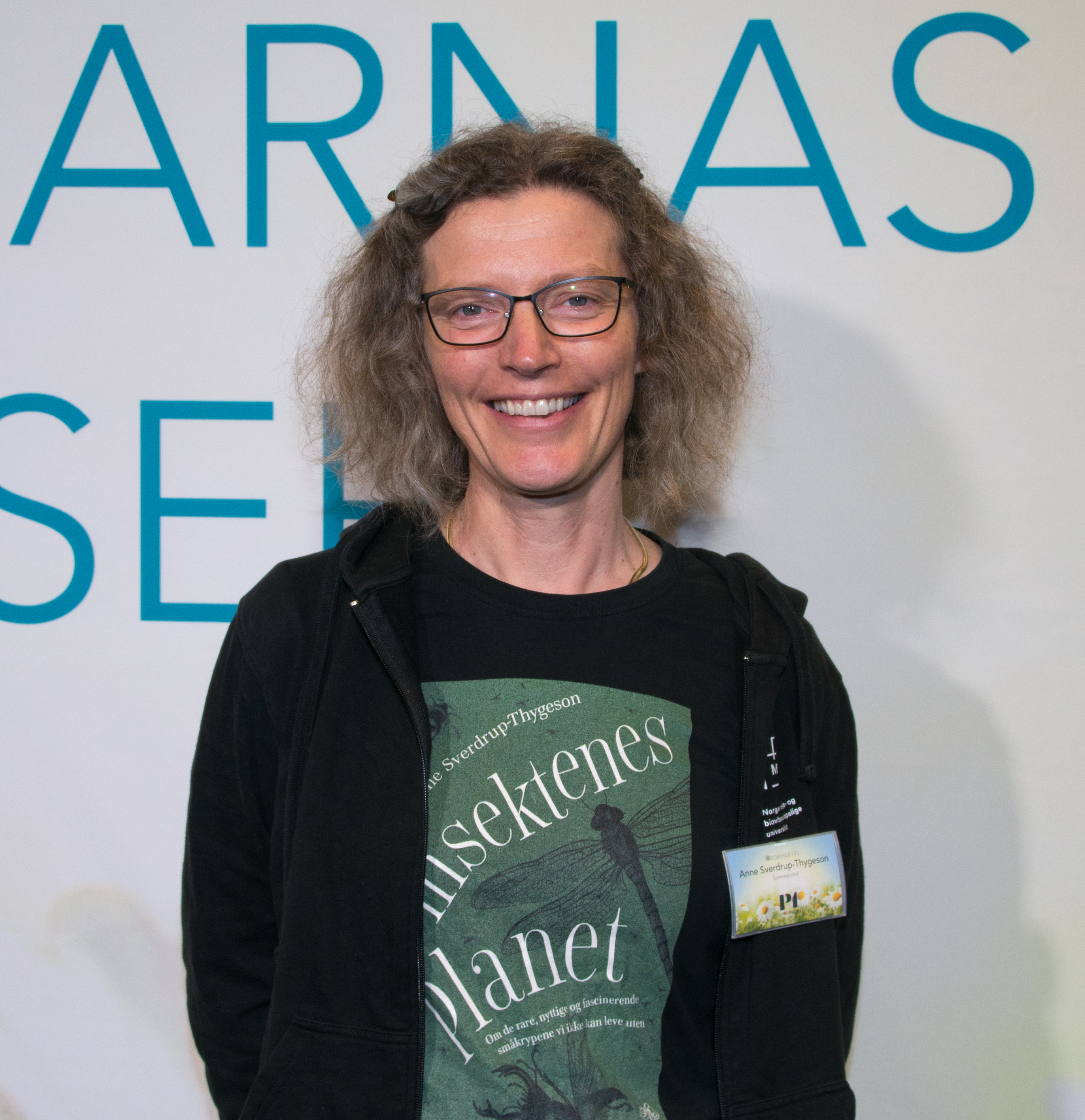 Anne Sverdrup-Thygeson, Sommarvärd i P1, på röda mattan på väg in i Berwaldhallen i Stockholm den 13 juni 2019.